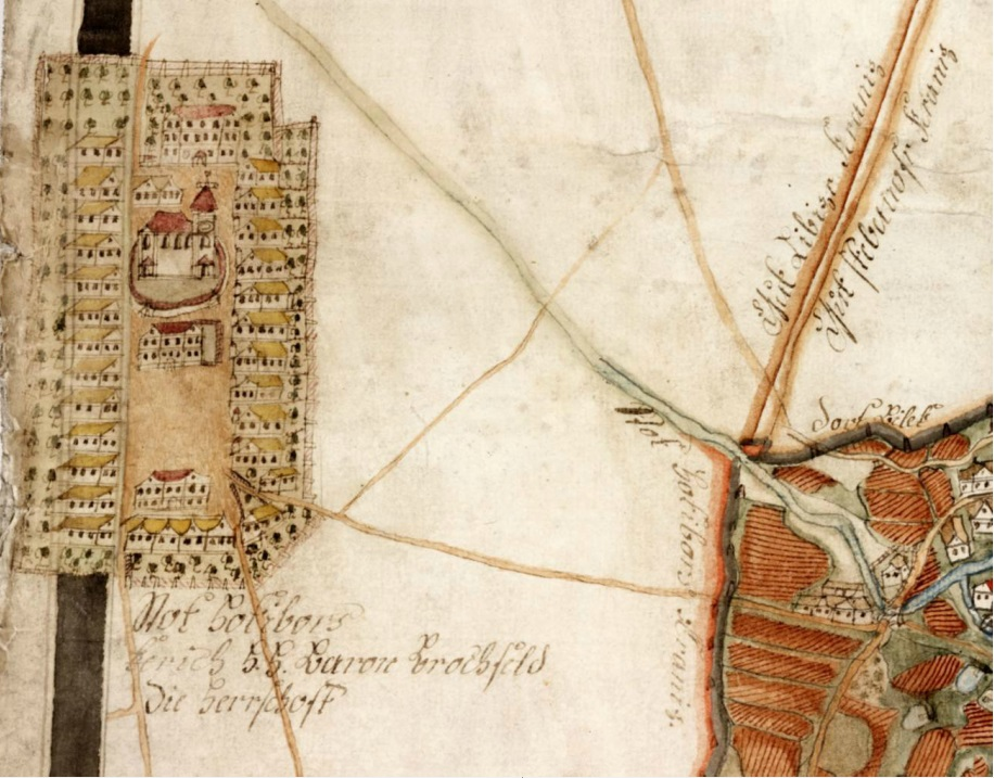 Chotěboř 1786 - 1802 (výřez z celkové přehledové mapy panství Polná-Přibyslav s pohledovým vyobrazením každého města)